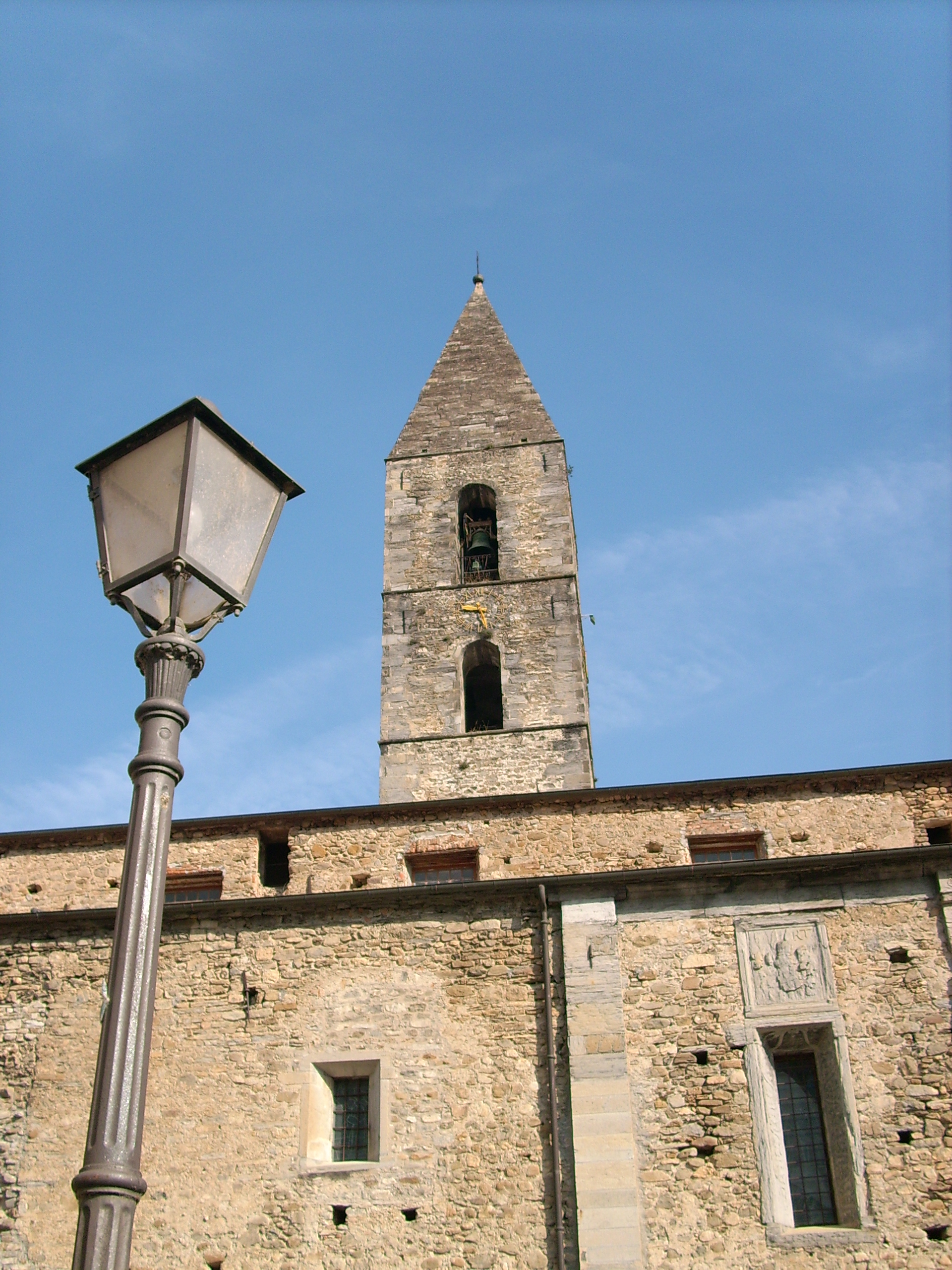 Pigna (IM), Liguria, Italia